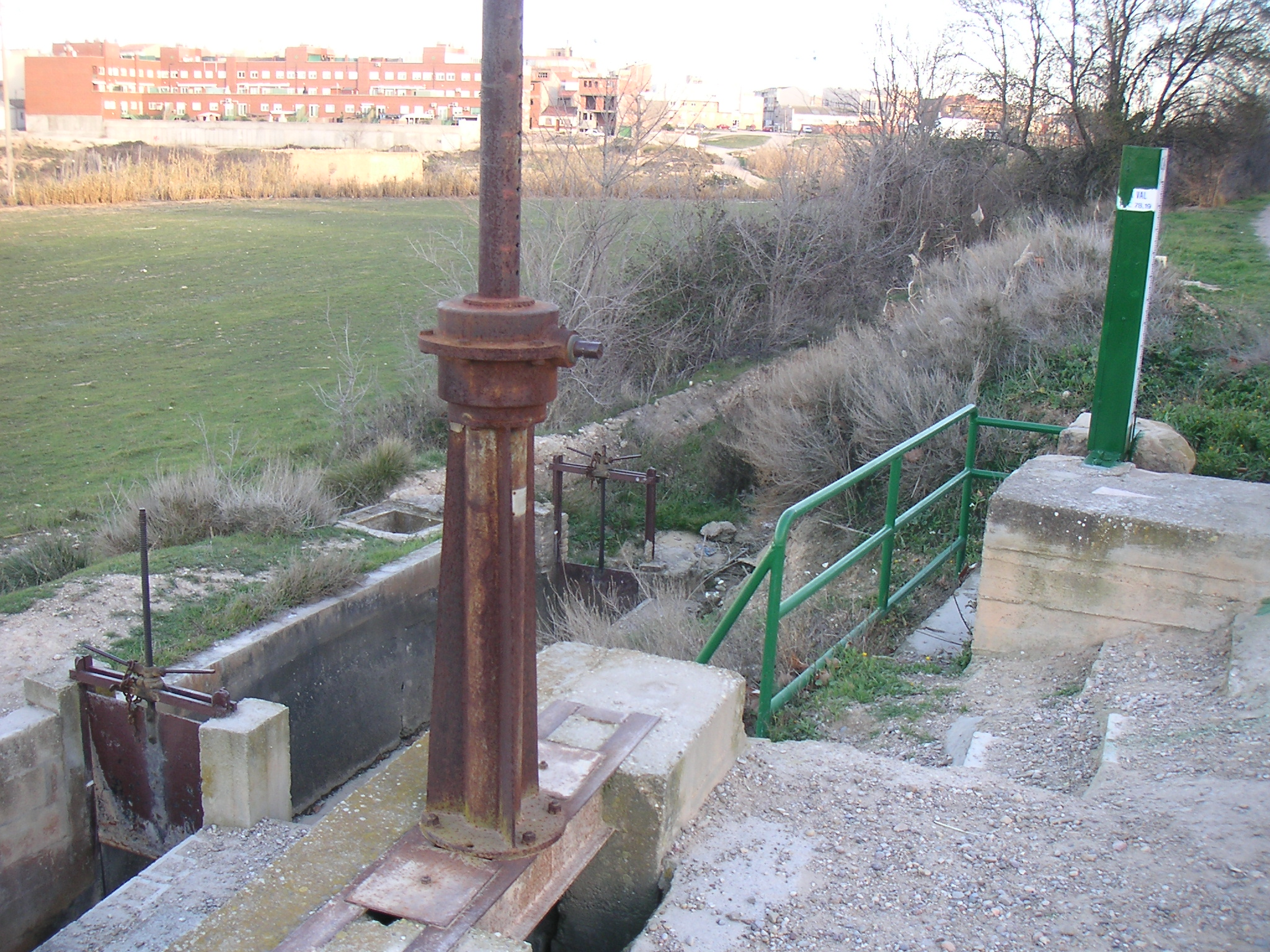 Toma de aguas de la acequia de La Val (del fierro).